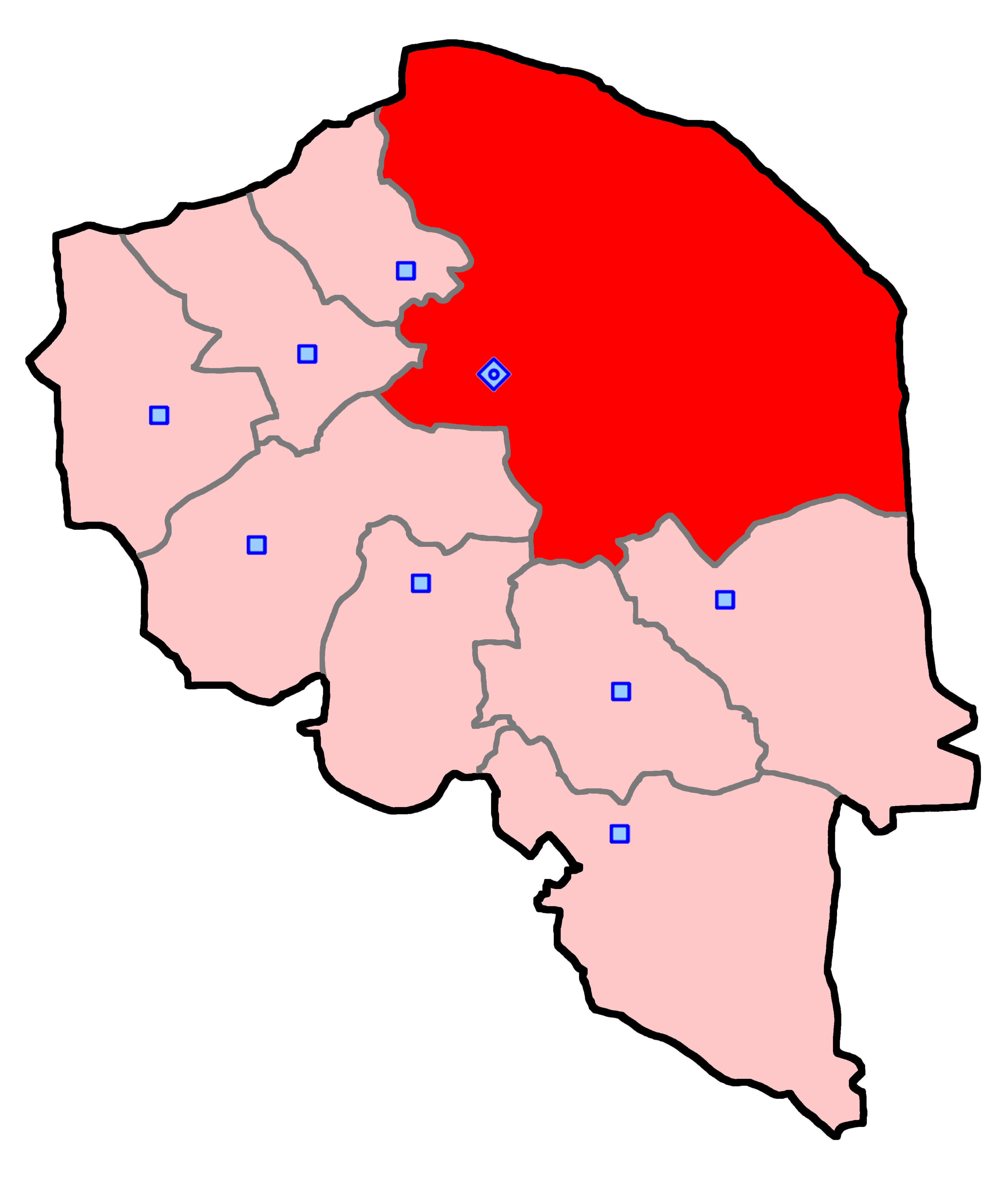 کرمان و راور برای انتخابات مجلس شورای اسلامی